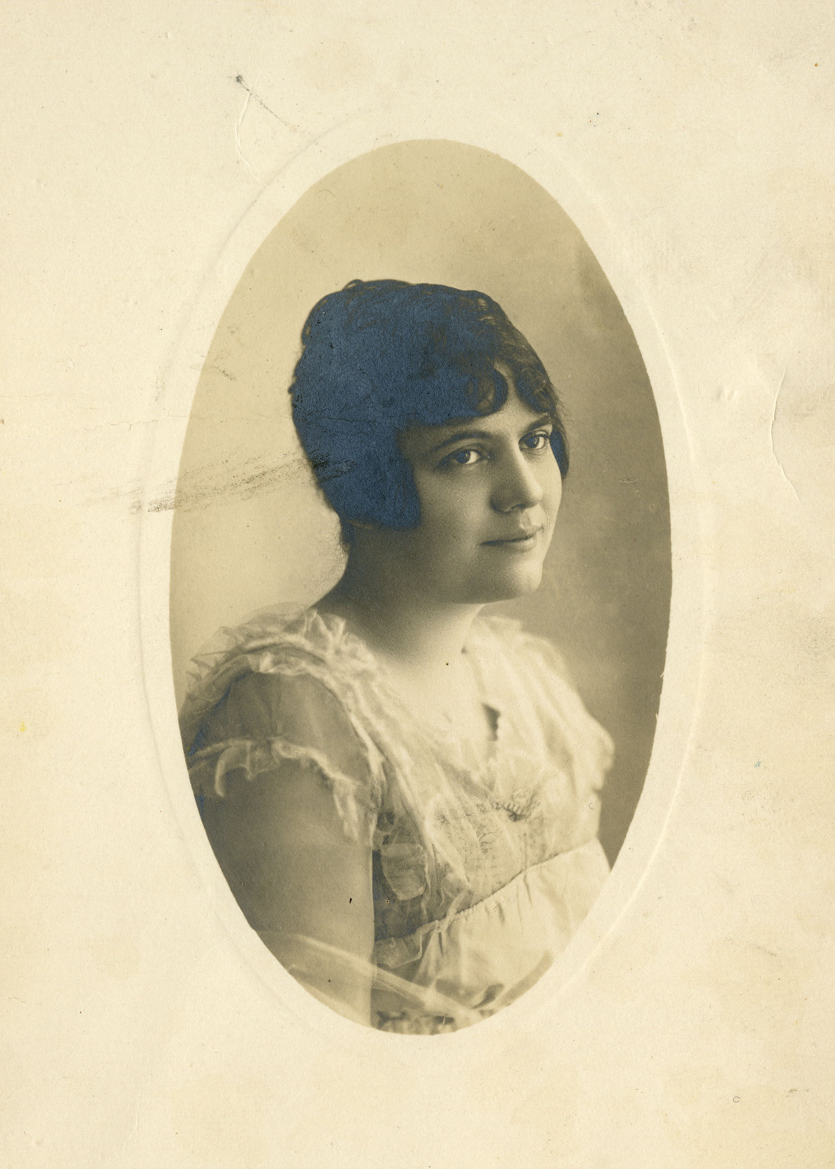 Adrienne Roy-Vilandré. Portrait adolescente.